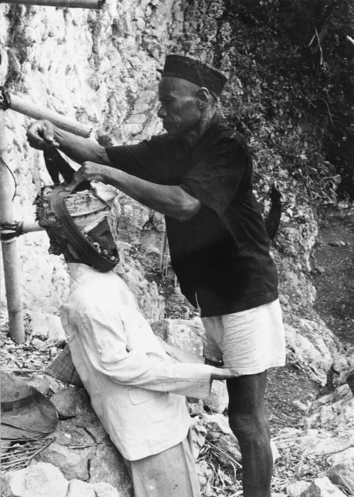 Negatief. De tau-tau is een pop die de overledene voorstelt.. De tau-tau van een vorst wordt opnieuw aangekleed op de begraafplaats der vorsten van Sangalla'